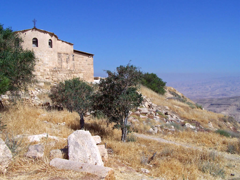 Mount Nebo, Jordan